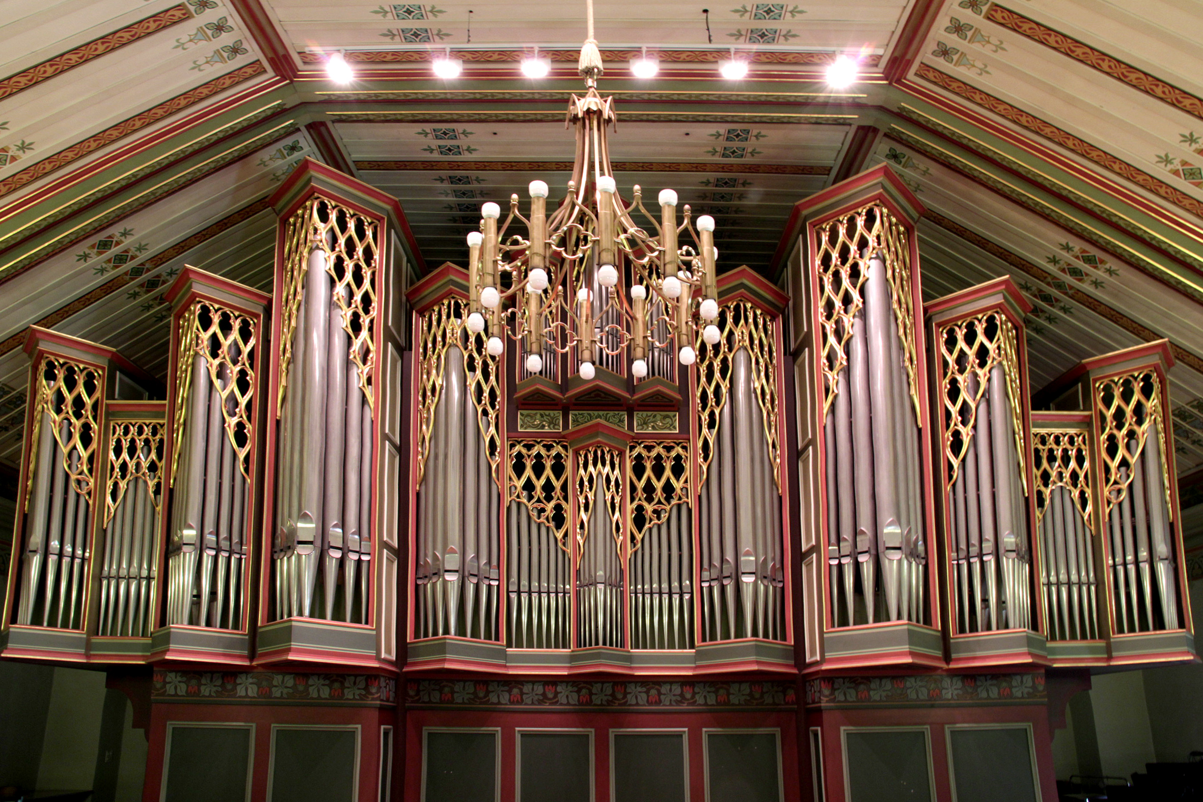 Römisch-katholische Kirche St. Peter und Paul (Zürich)